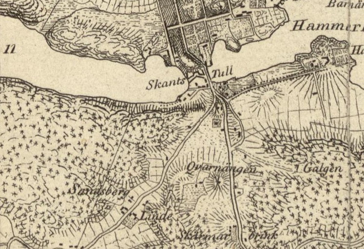 Del av 1817 års karta över Stockholm med omgivningar visnade bl.a. Skanstull, Galgbacken, Kvarnängen, Skärmarbrink, Sandsborg